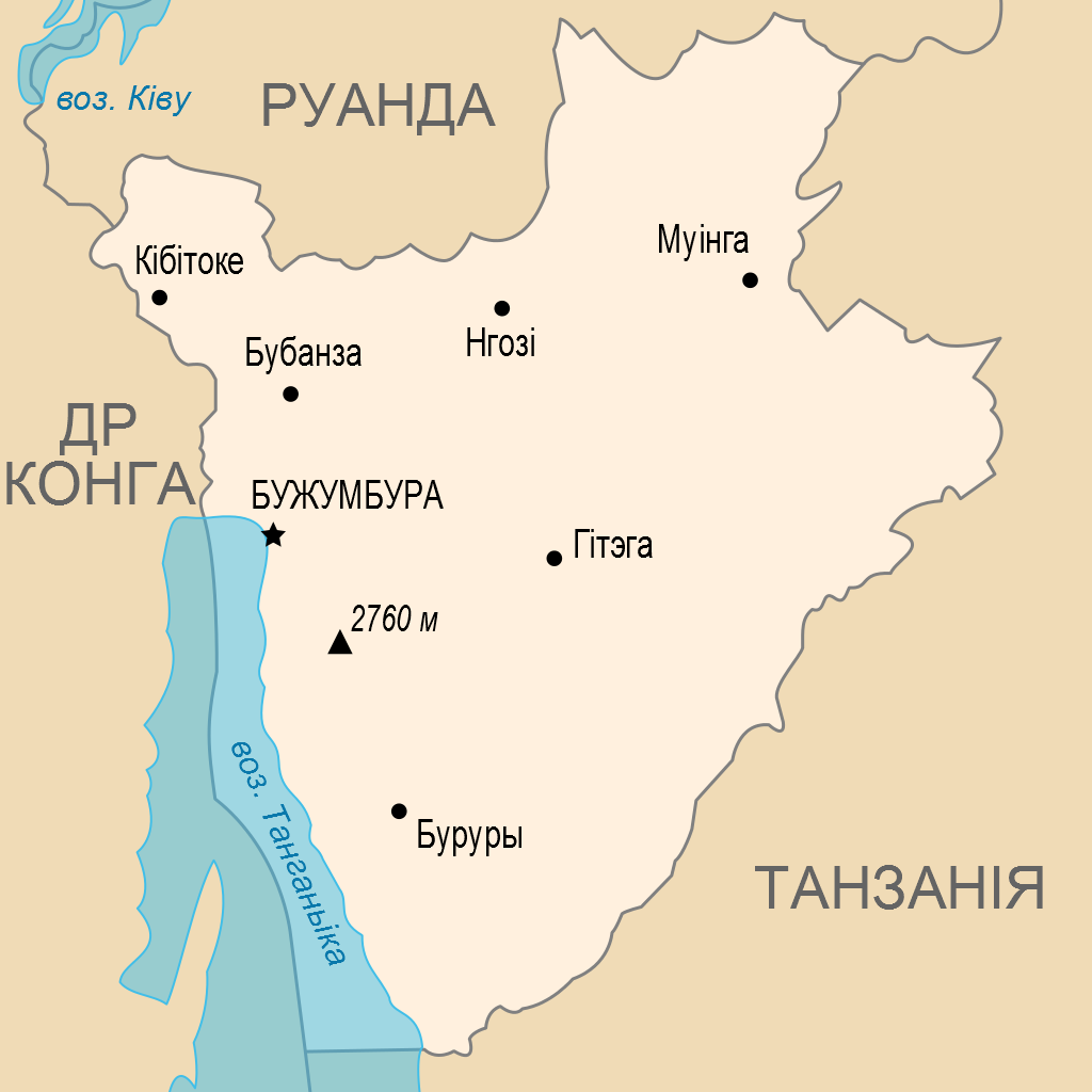 Карта Бурундзі